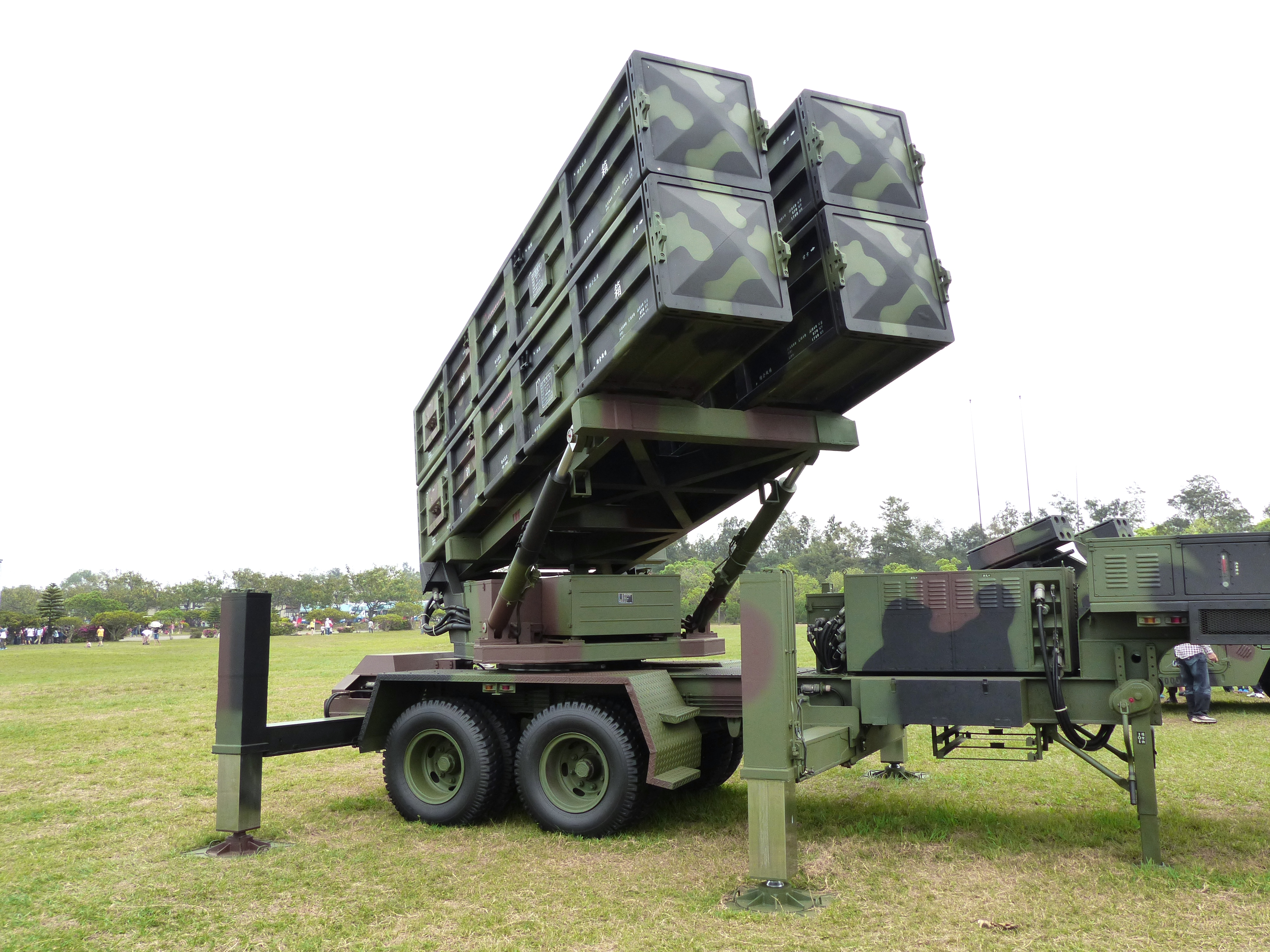 中文（台灣）: 2014年陸軍湖口營區開放活動，操場展示的天弓二型防空飛彈發射車訓練用彈框特寫。